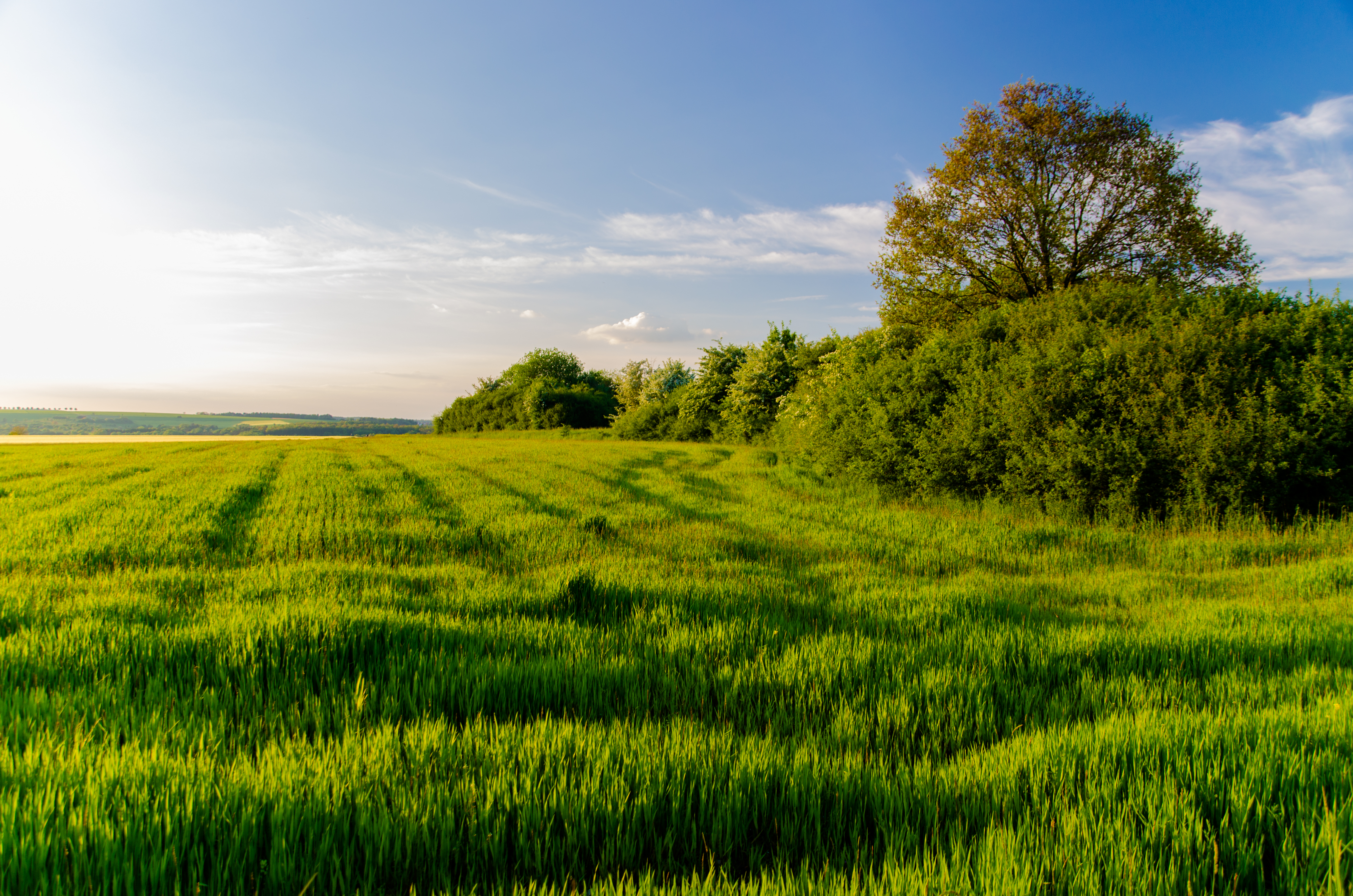 Landschaftsaufnahme auf der Breitfurter Höhe